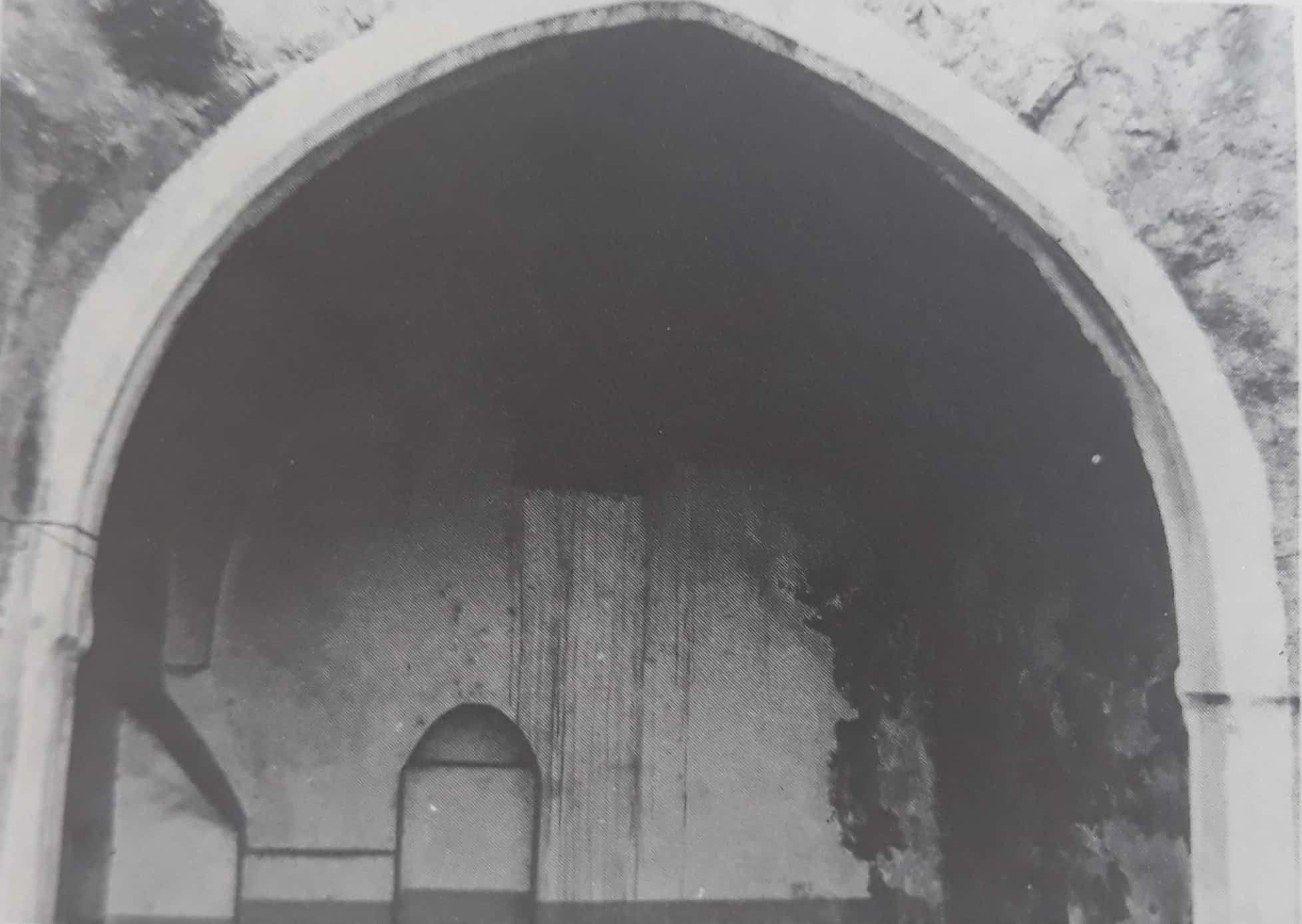 الزاوية الخُتَنِيَّة، أنشاها صلاح الدين الأيوبي في سنة 587 هـ / 1191 م، وقفها عل الشيخ جلال الدين أحمد بن محمد الشاشي